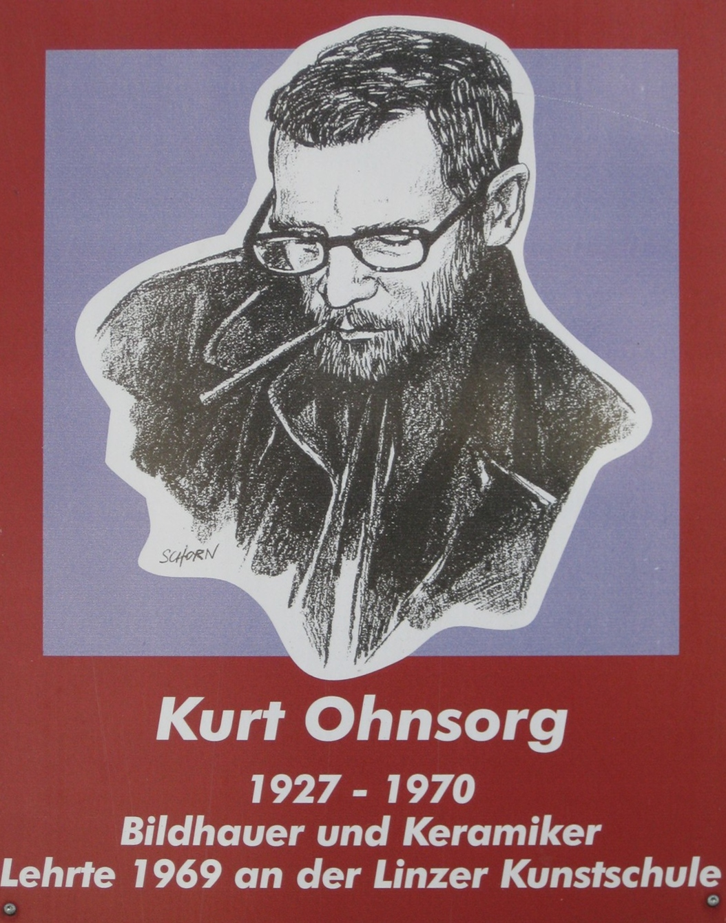 Kurt Ohnsorg-Gedenktafel im Josef Bohmann-Hof am Alfred Kubin-Platz, Wien Donaustadt.